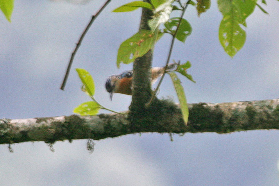 Tashigang to Norphang La